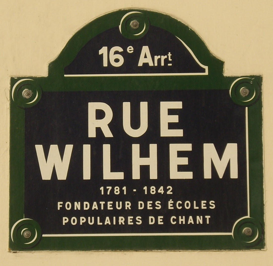 Plaque de rue au nom de Wilhem créateur de l'Orphéon en 1833.